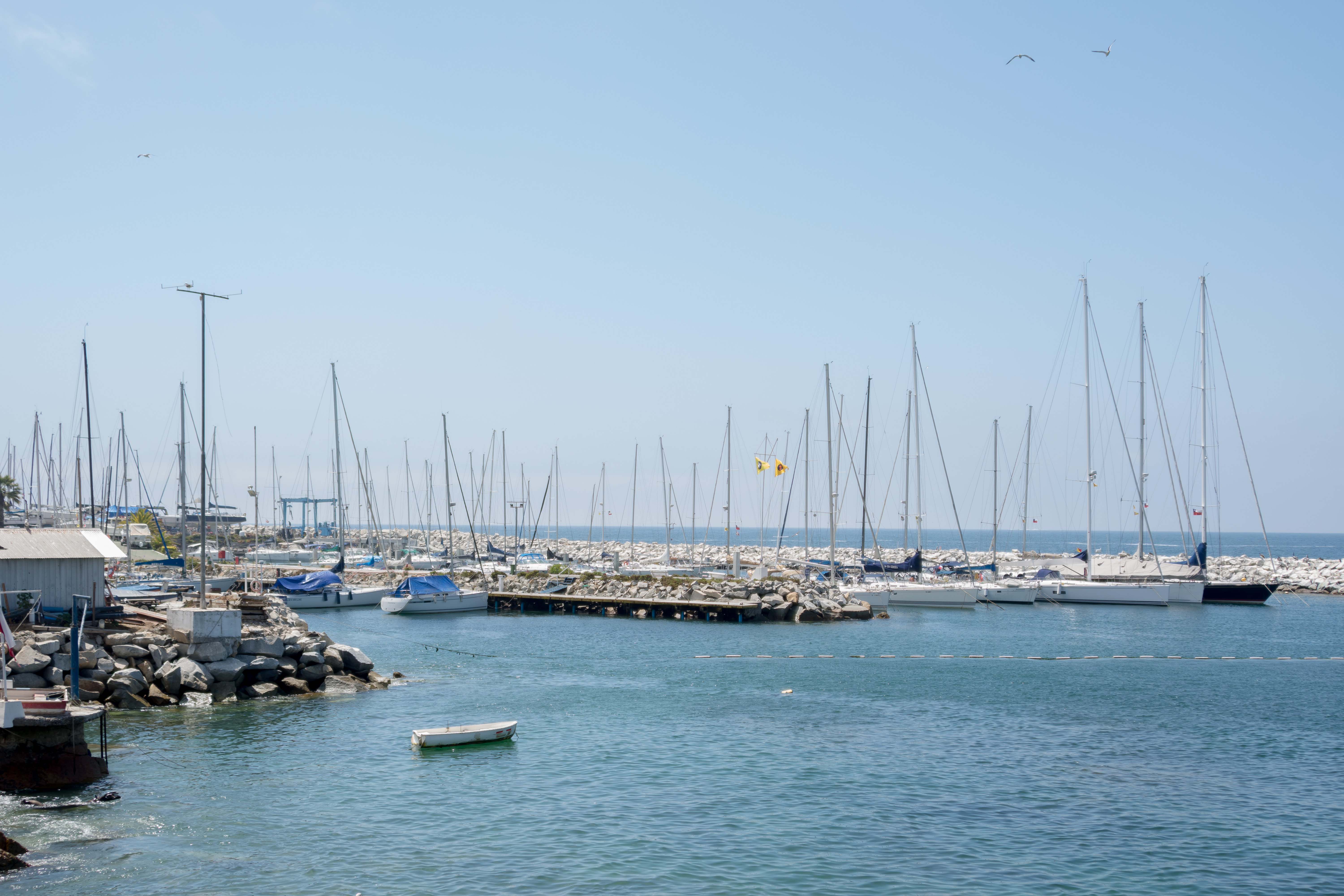 Club de Yates Higuerillas, Concón, Región de Valparaíso, Chile